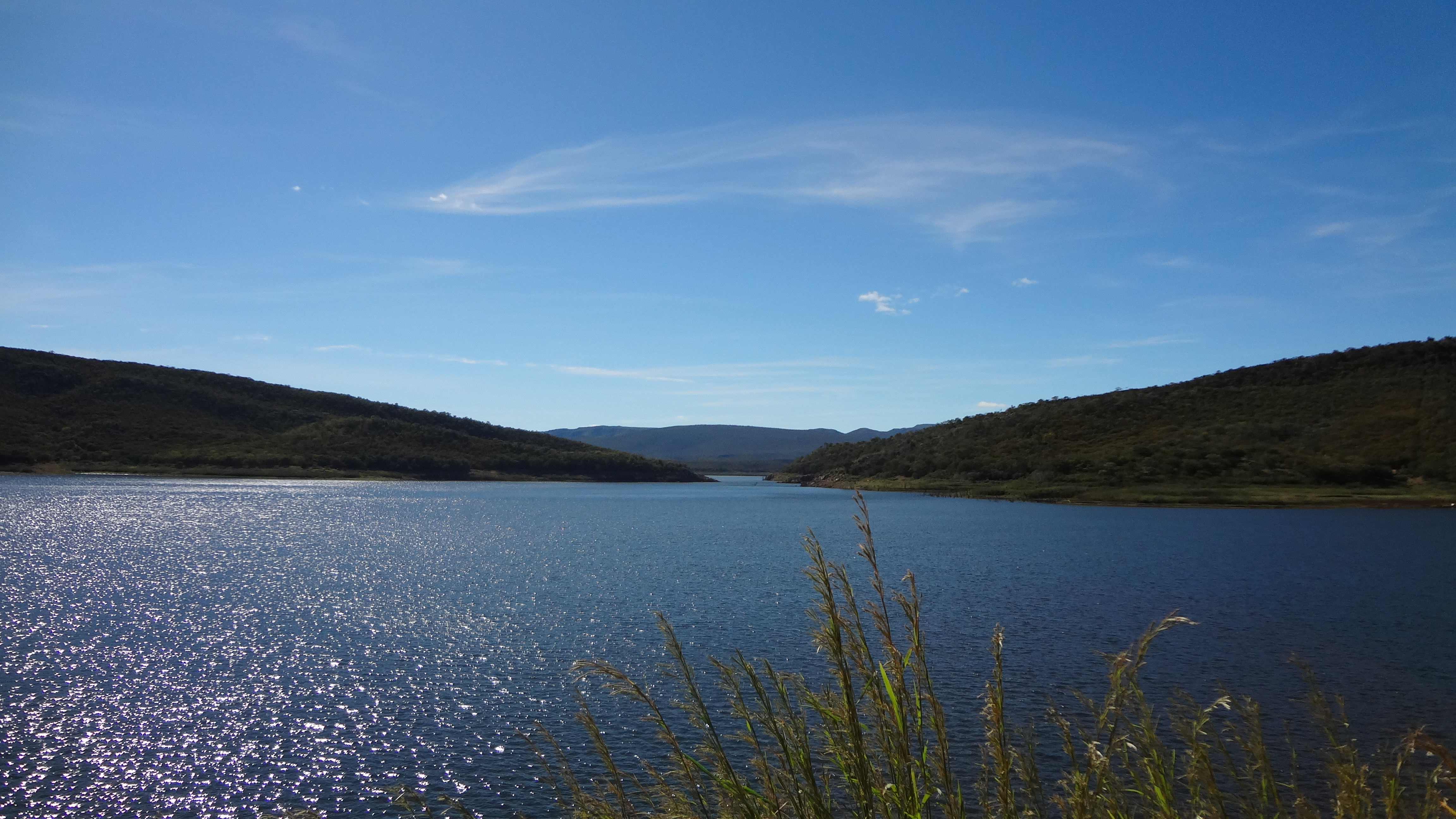 Bela Imagem que reluz a grandeza da Barragem do Bico da Pedra.